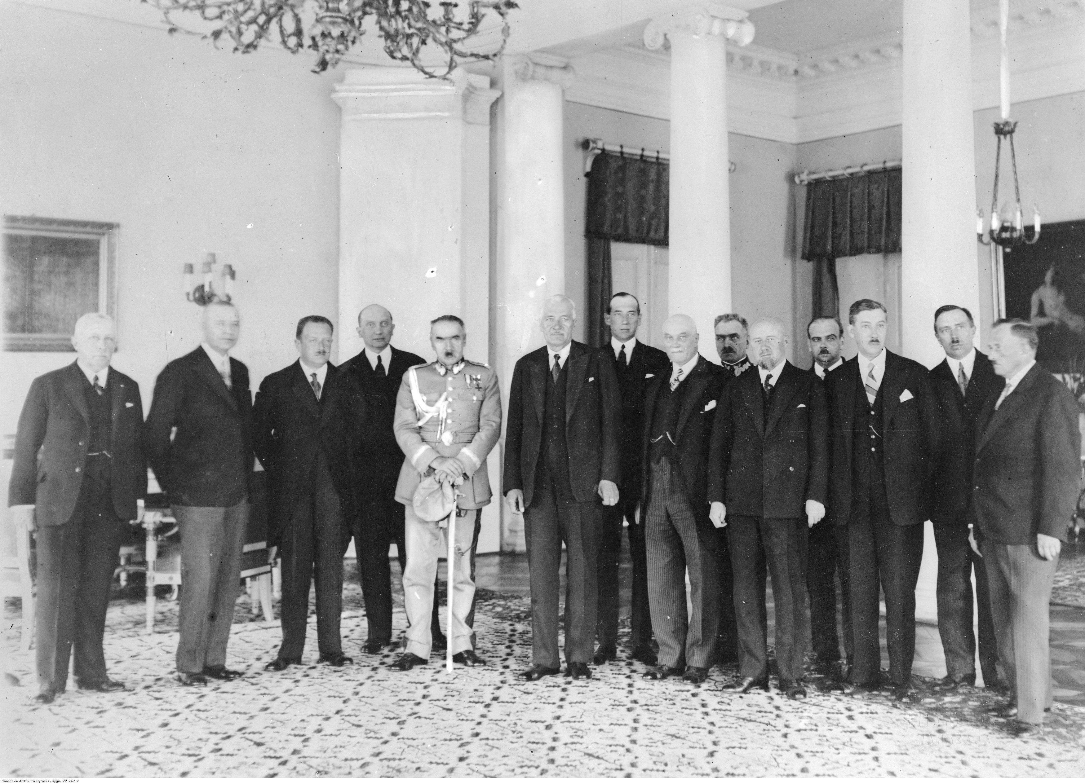 Ministrowie drugiego rządu Józefa Piłsudskiego po zaprzysiężeniu - fotografia grupowa. Widoczni od lewej: minister robót publicznych Maksymilian Matakiewicz, minister sprawiedliwości Stanisław Car, minister wyznań religijnych i oświecenia publicznego Sławomir Czerwiński, minister spraw zagranicznych August Zaleski, premier i minister spraw wojskowych Józef Piłsudski, prezydent Ignacy Mościcki, wicepremier i minister "bez teki" Józef Beck, minister rolnictwa i dóbr państwowych Leon Janta Połczyński, minister spraw wewnętrznych Felicjan Sławoj Składkowski, minister pracy i opieki społecznej Aleksander Prystor, minister skarbu Ignacy Matuszewski, minister przemysłu i handlu Eugeniusz Kwiatkowski, minister reform rolnych Witold Staniewicz, minister poczt i telegrafów Ignacy Boerner.